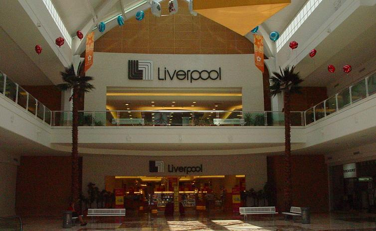 Vista del centro comercial Galerías Laguna, al fondo, Liverpool Torreón.